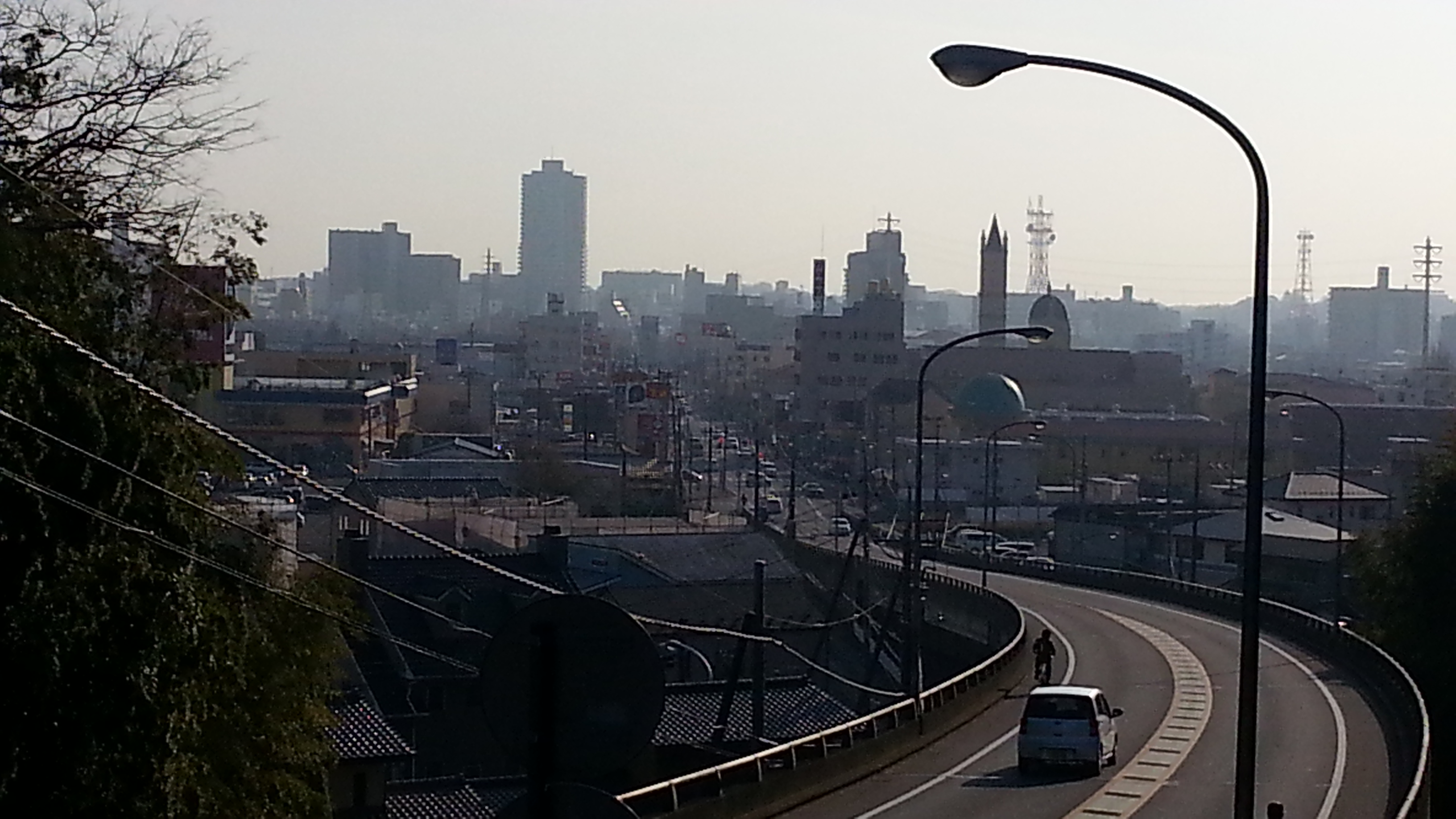 東真鍋町からの中心市街地